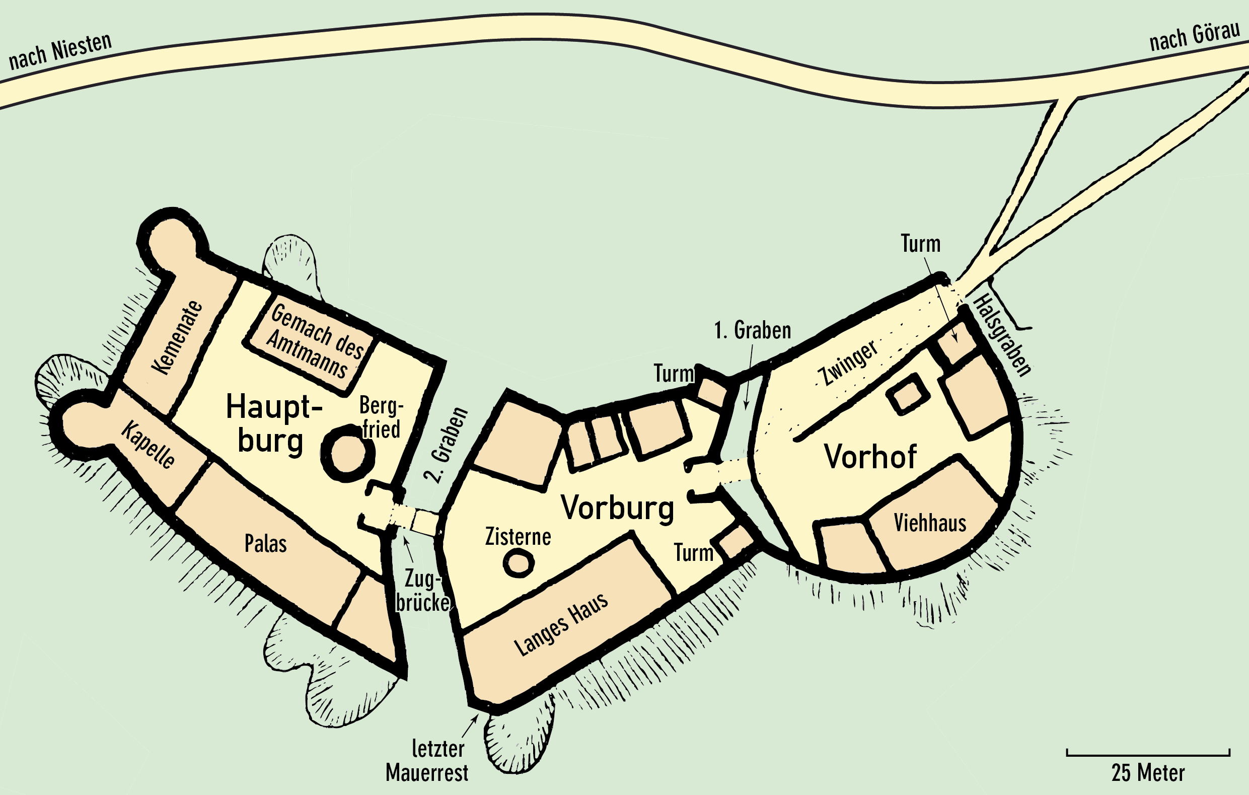 Grundriss der Burgruine Niesten aus der Zeit vor 1525